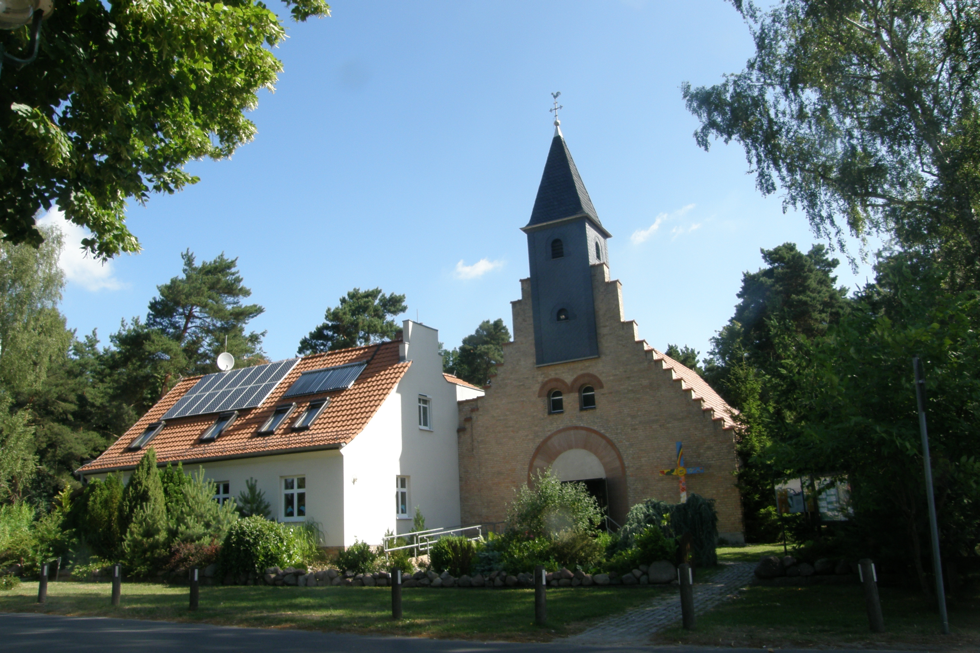 Kirche "St. Konrad" mit Pfarrhaus